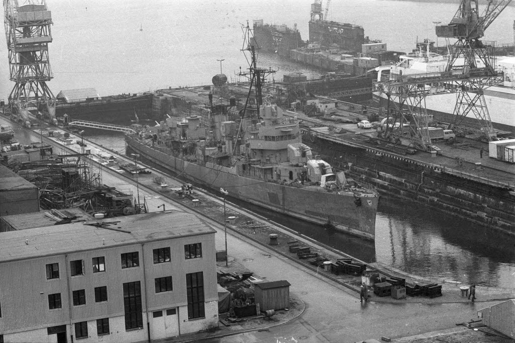 Zerstörer Z 4 (D 178) im Dock der Howaldtswerke Deutsche Werft AG (HDW) in Gaarden zur Überholung.